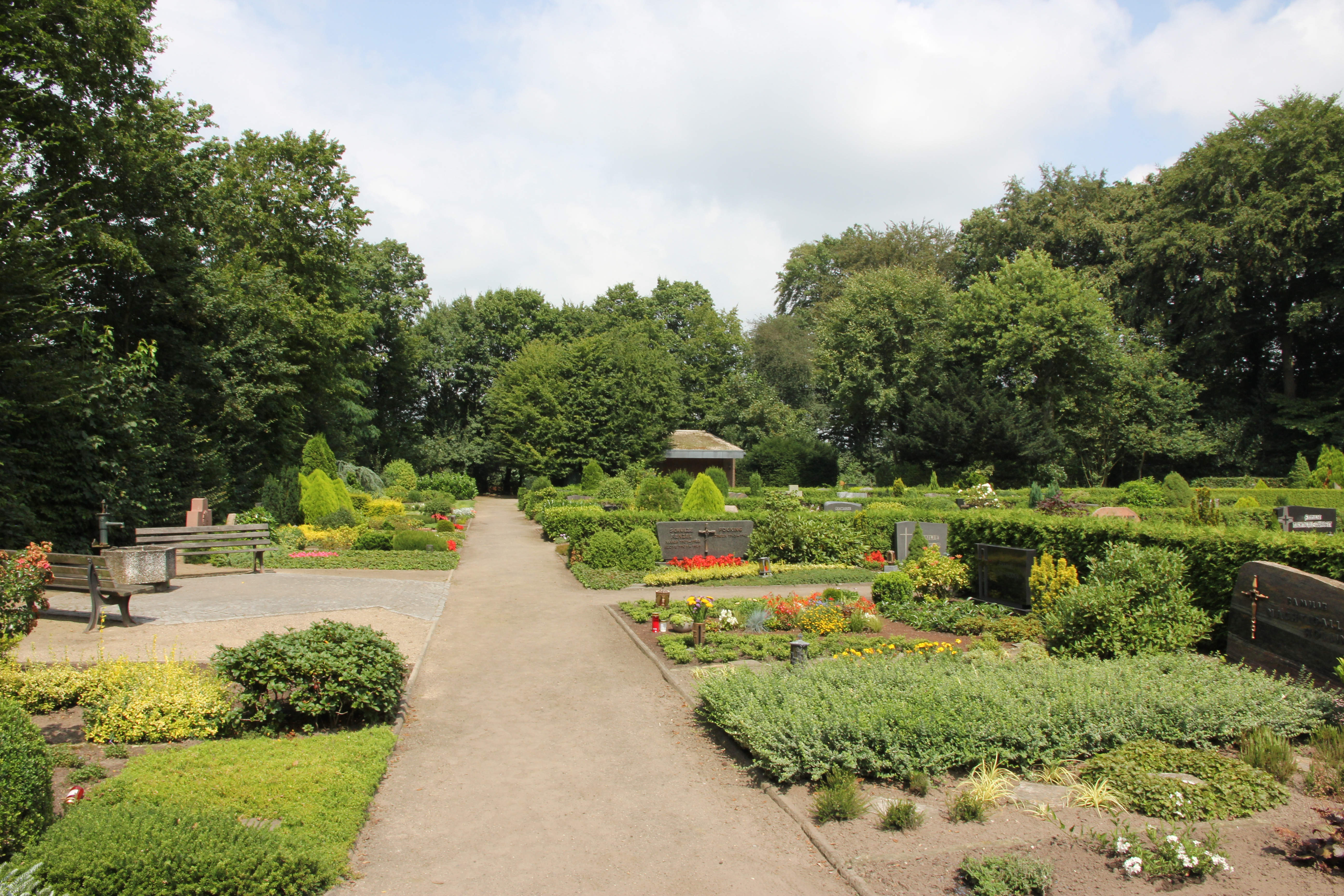 Friedhof der Kirche St. Maria Immaculata in Rhedebrügge, Borken, NRW